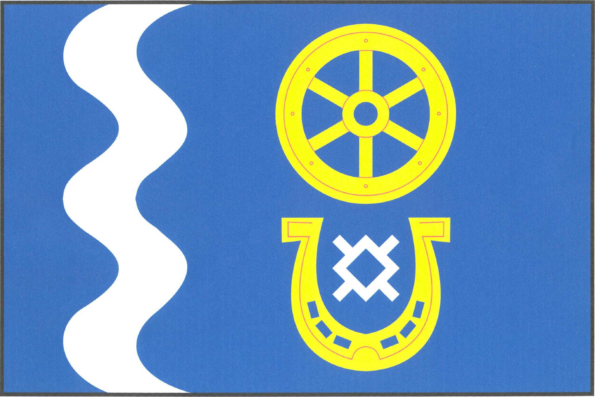 Vlajka obce Říčky v okrese Brno-venkov